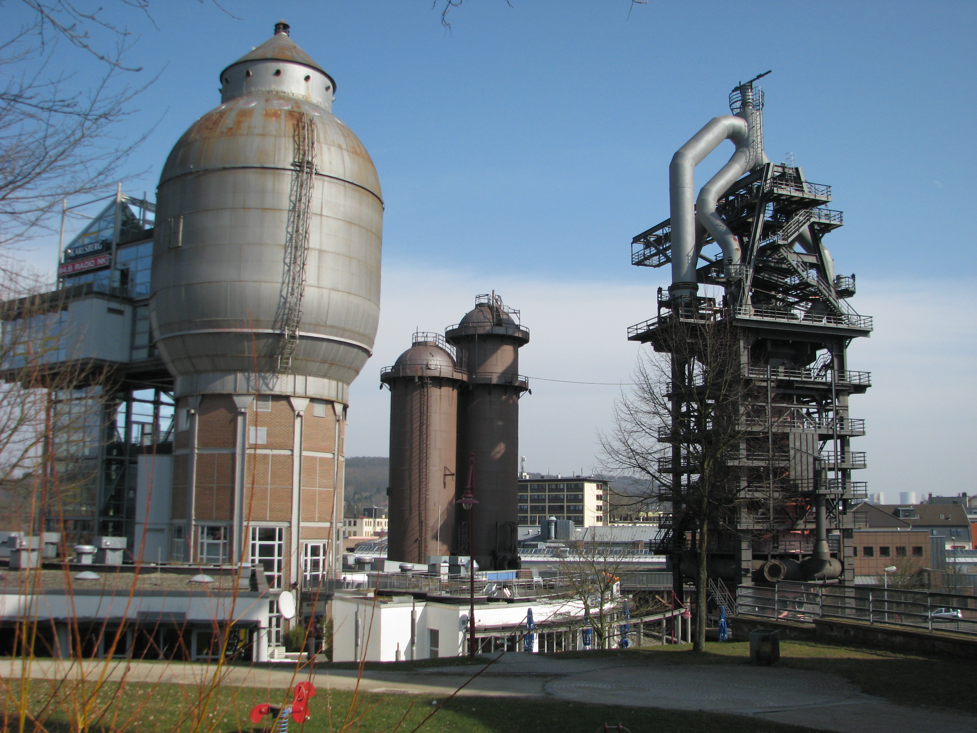 Historisches Hüttenareal Neunkirchen